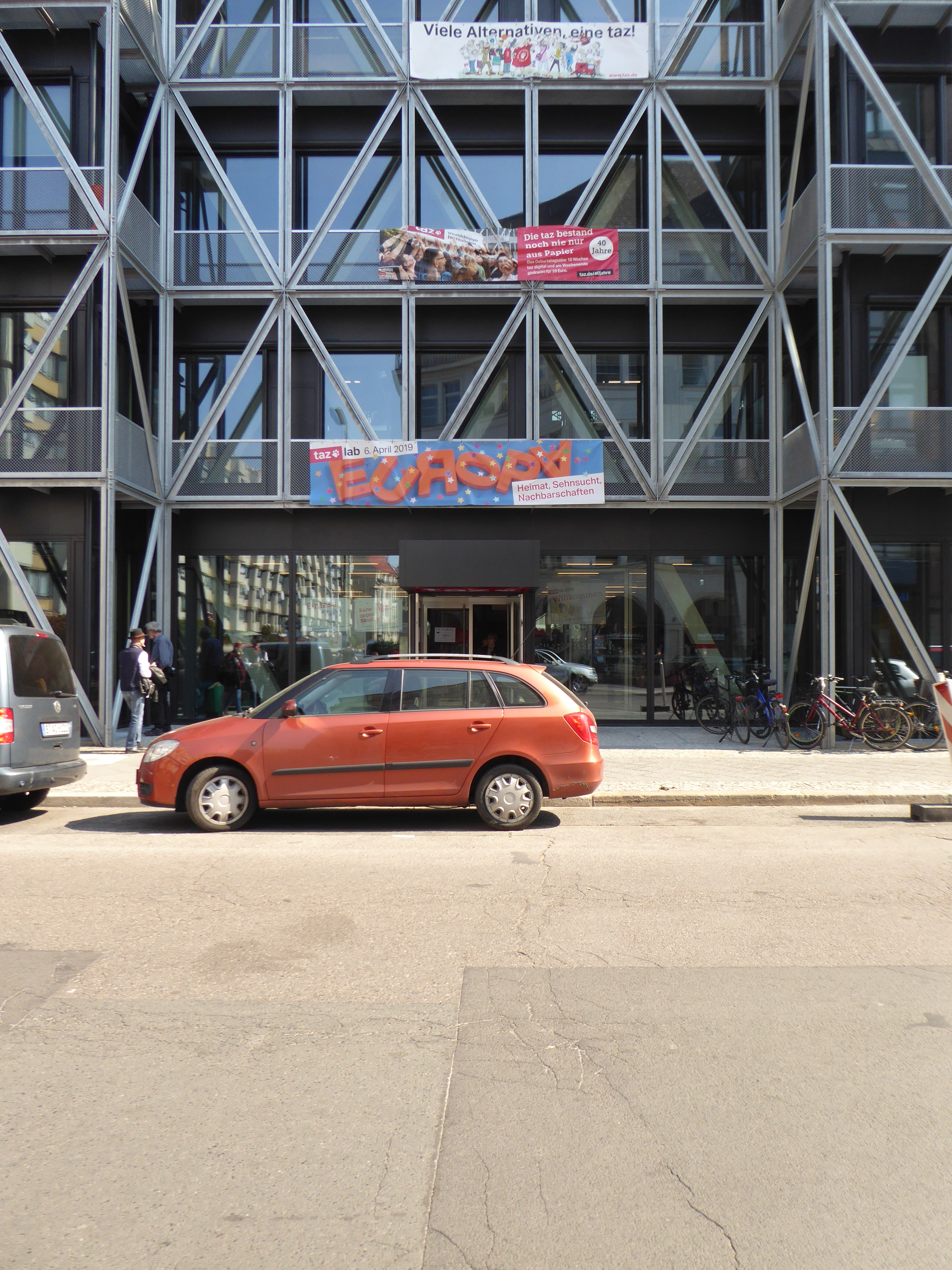 taz lab 2019, im neuen taz-Haus in der Friedrichstraße 21, 10969 Berlin